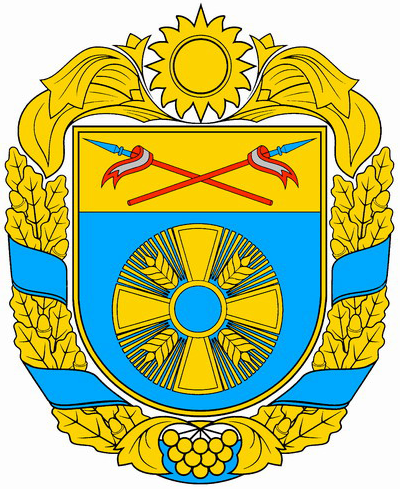 Герб Бобринецького району